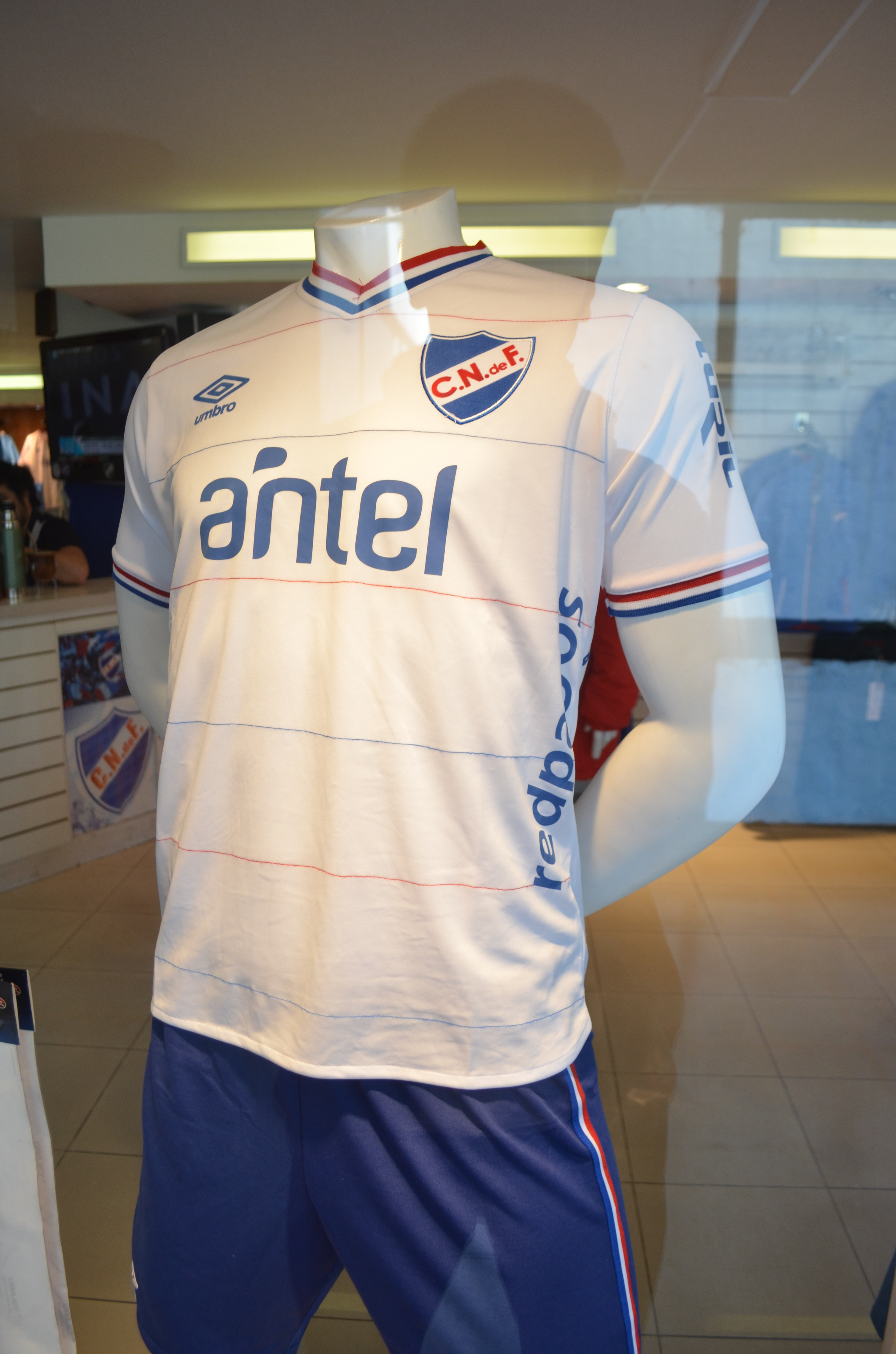 Camiseta titular de Nacional 2015-16